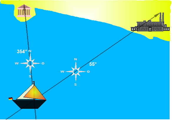 Rückwärts einschneiden Autor: Benutzer:Rainer Bielefeld